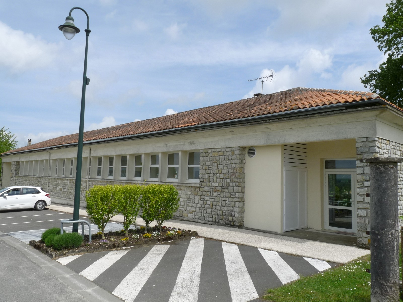 Ecole de Charmant, Charente, France